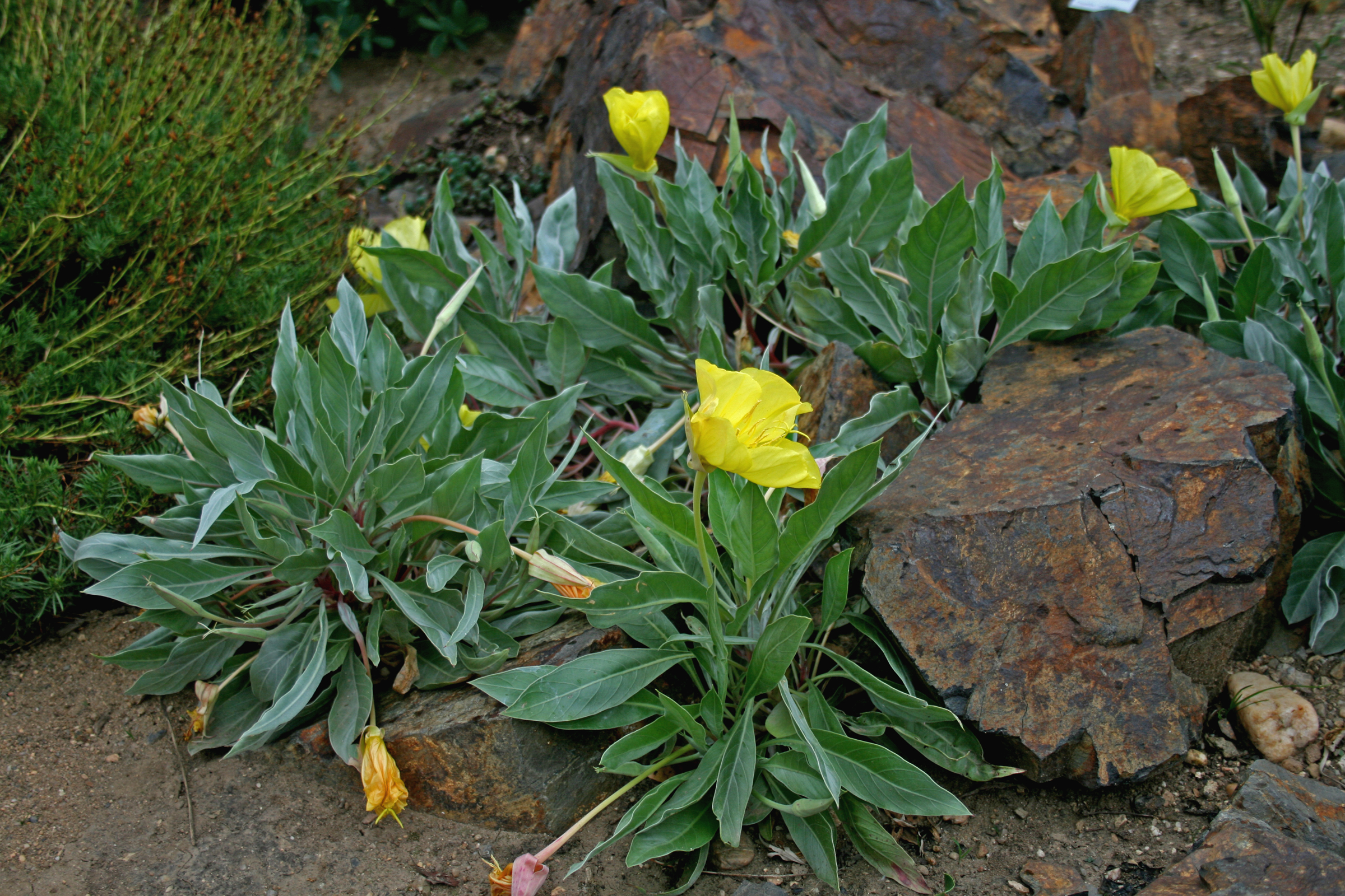 Oenothera macrocarpa in Prague Botanic Garden, Prague, Troja